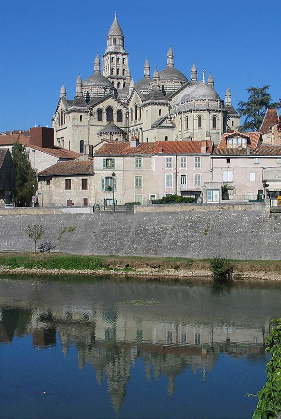 France, Perigueux Cathedrale of Saint-Front.